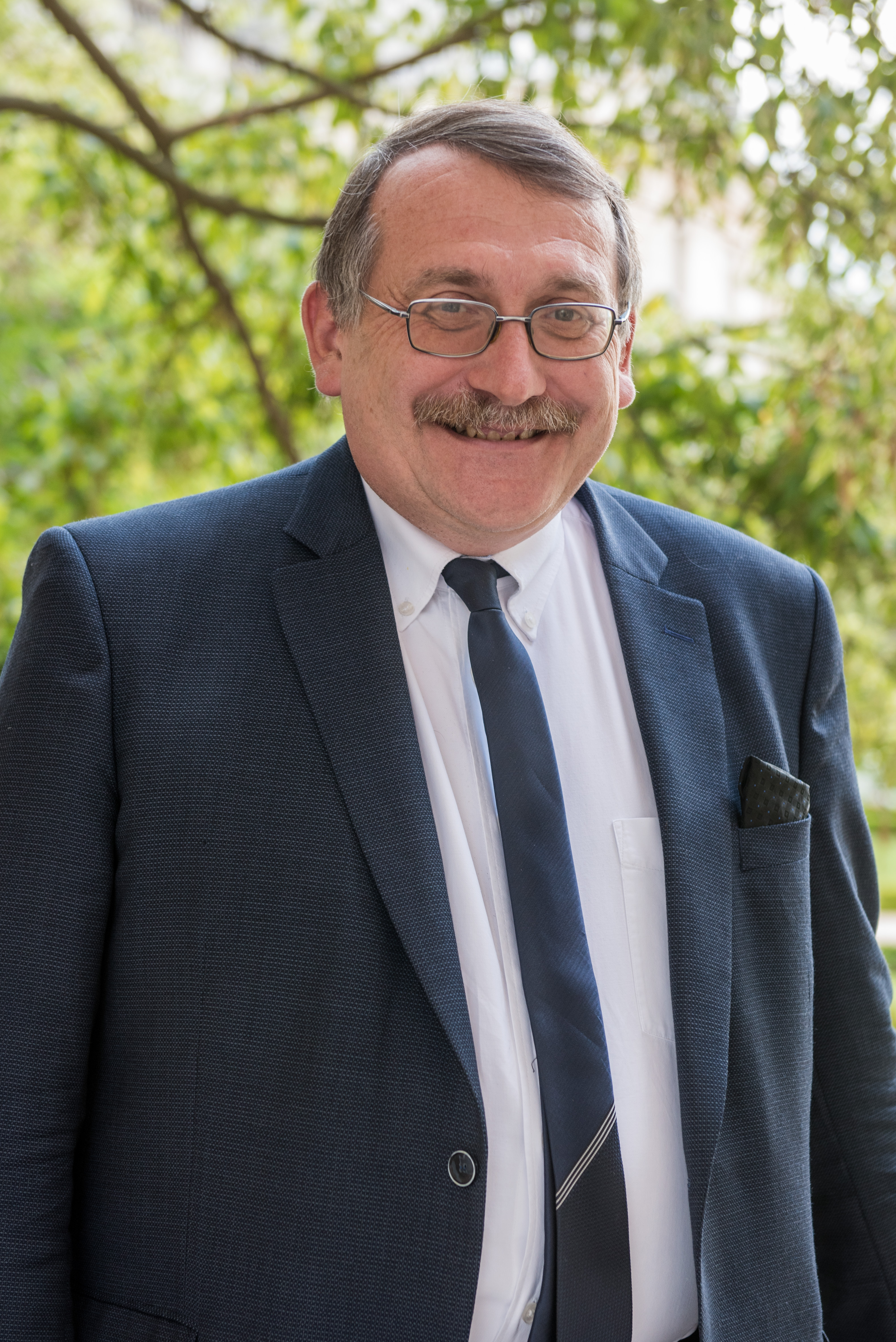 Joël Giraud dans le jardin des Quatre colonnes du palais Bourbon en 2017.